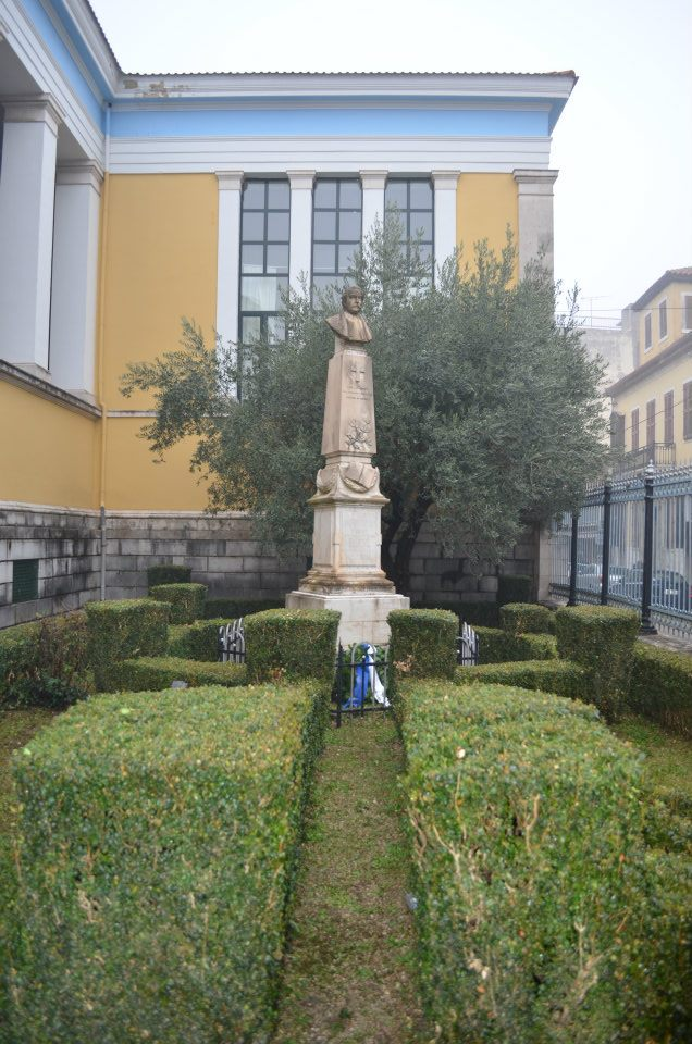 Mvskoke: 1ο Γυμνάσιο Ιωαννίνων